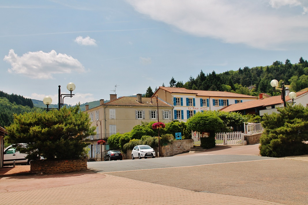 La Ville